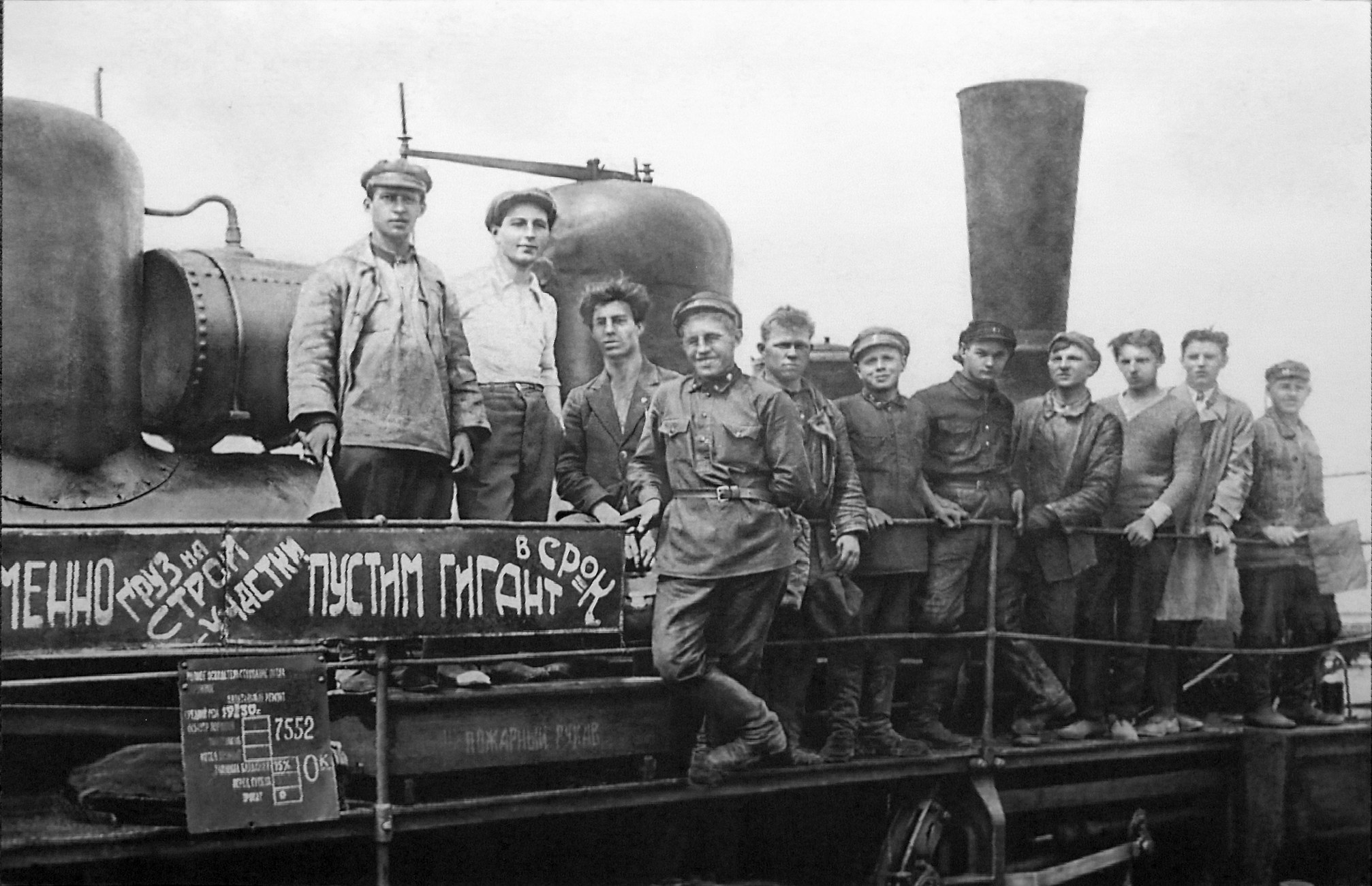 Группа комсомольцев на паровозе Ок, Магнитогорск